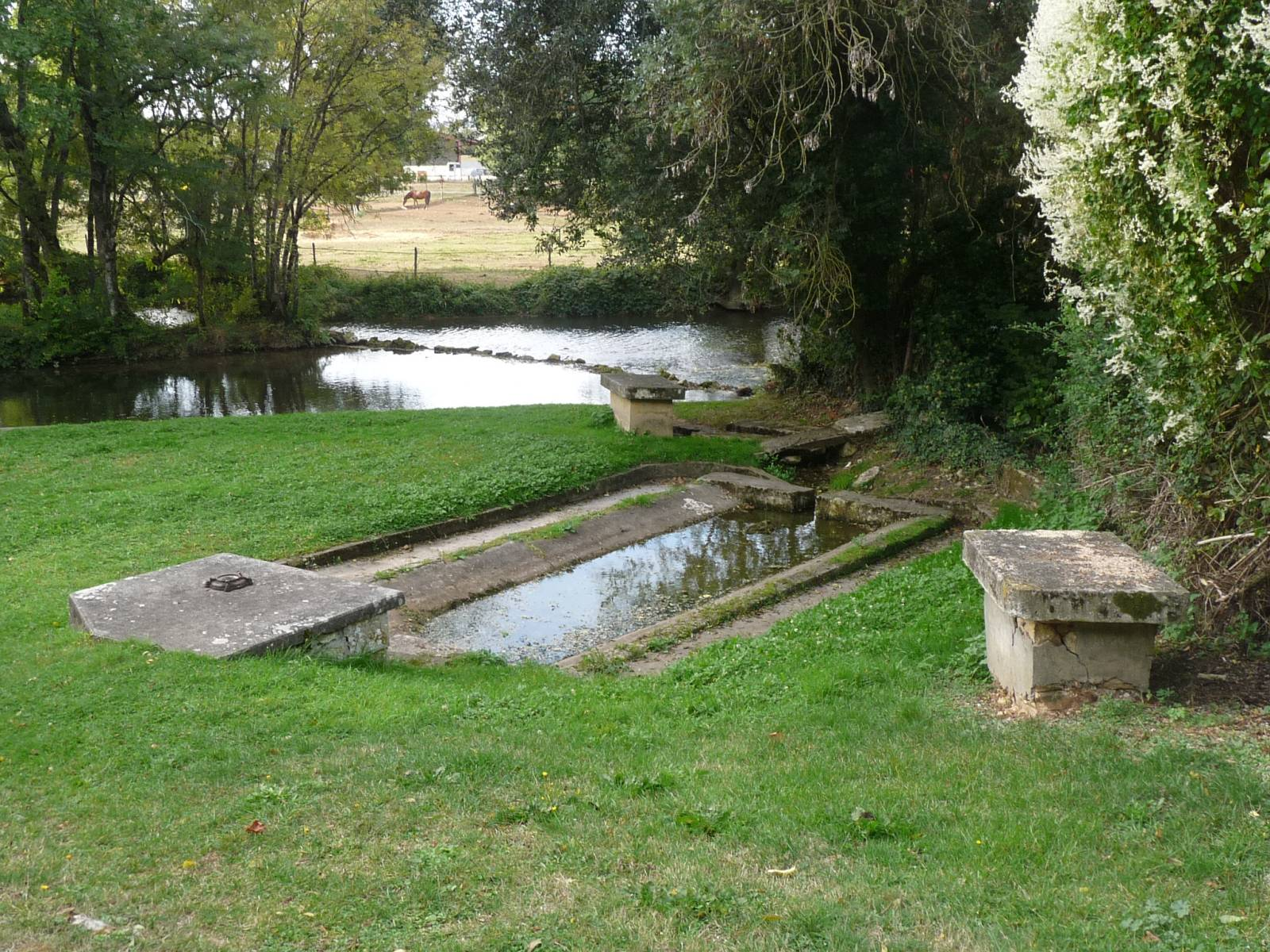 lavoir de St-Front, Charente, France